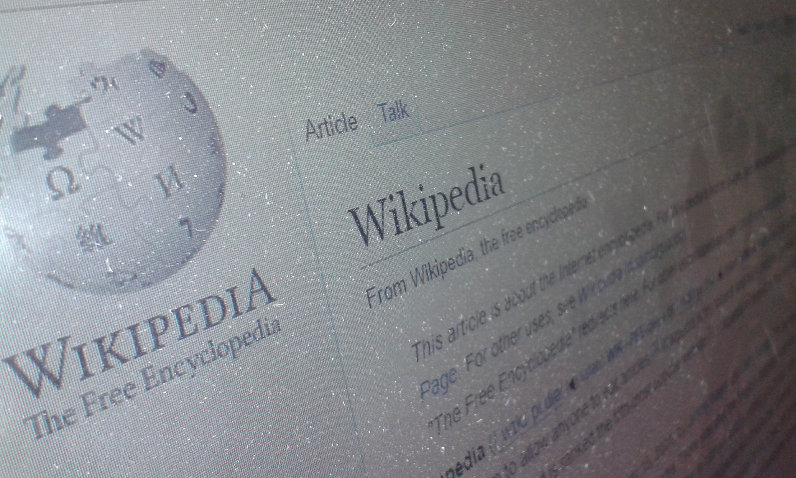 تعد موسوعة ويكيبيديا ورفيقاتها من الموسوعات المجانية من بين المنظمات الغير ربحية وذلك لنشر العلم والمعرفة في جميع أرجاء العالم